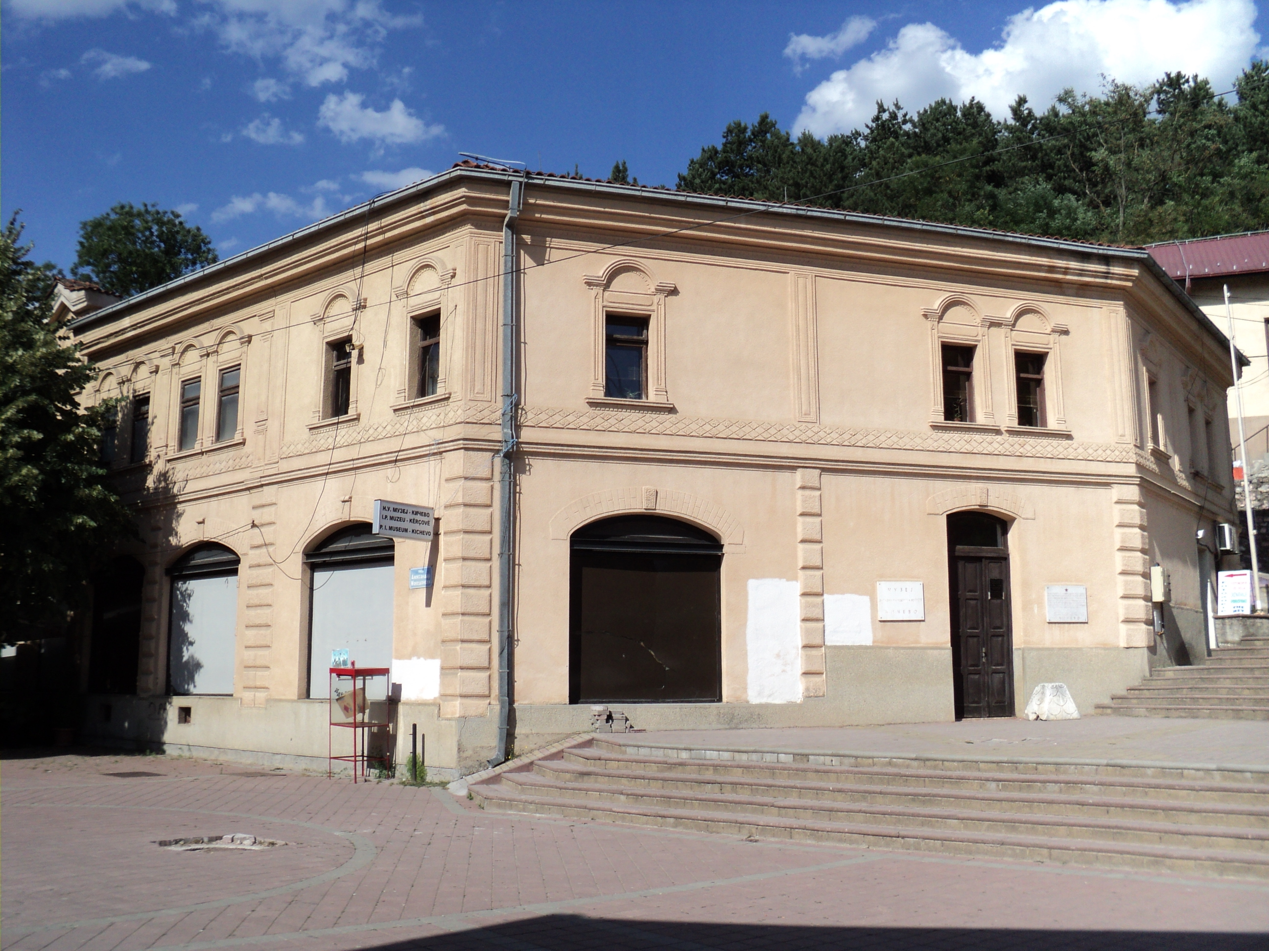 Zgrada Muzeja Zapadne Makedonije u centru Kičeva, otvorena 1980. godine.